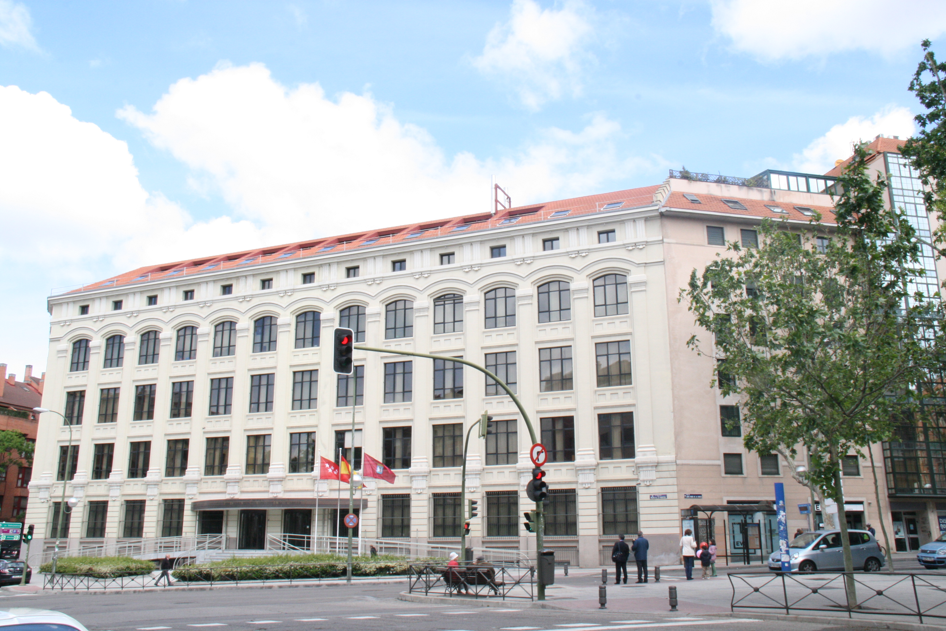 Fábrica Osram - Arganzuela (Madrid) - España